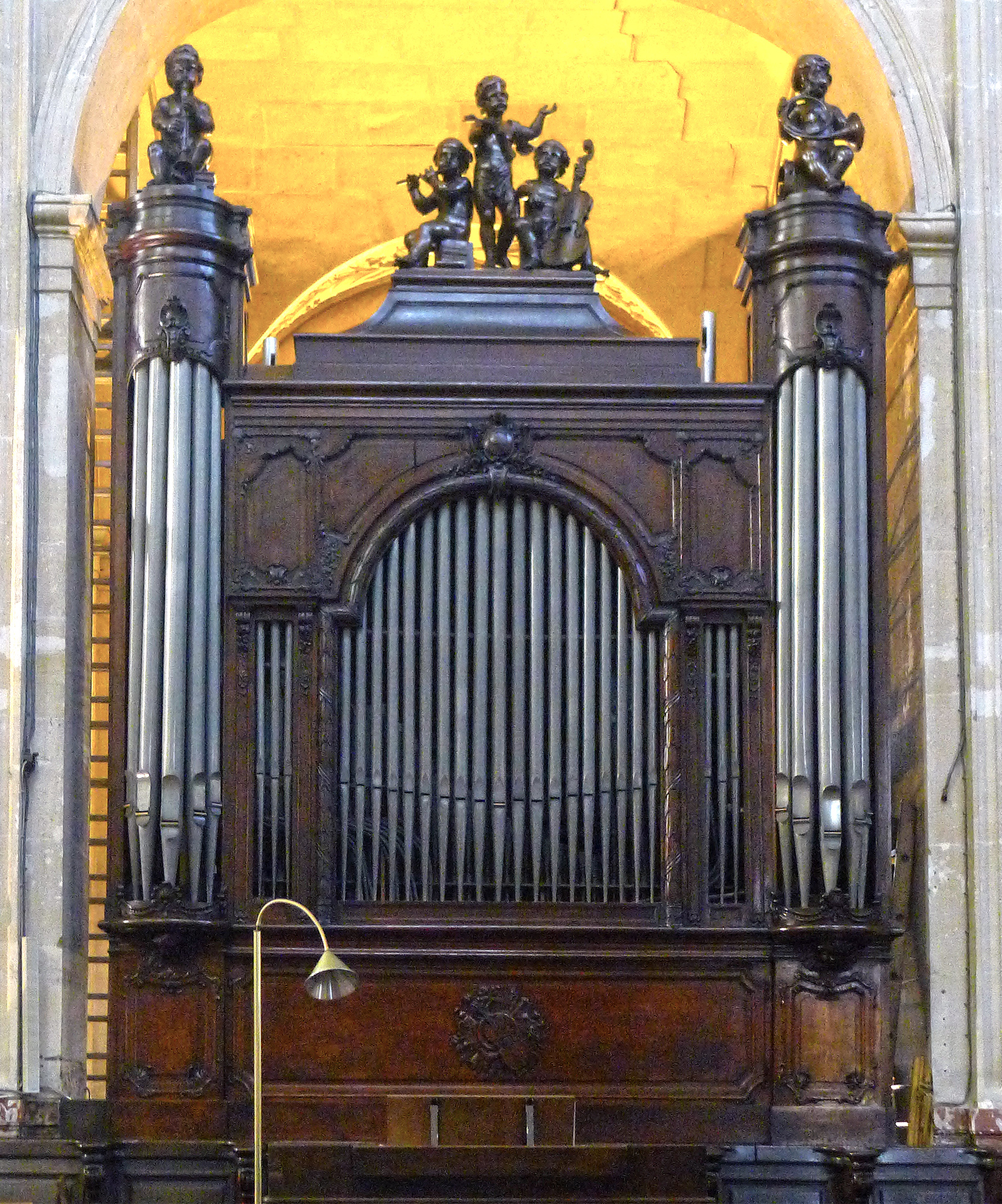 Église Saint-Nicolas-du-Chardonnet (orgue de choeur) - Paris V